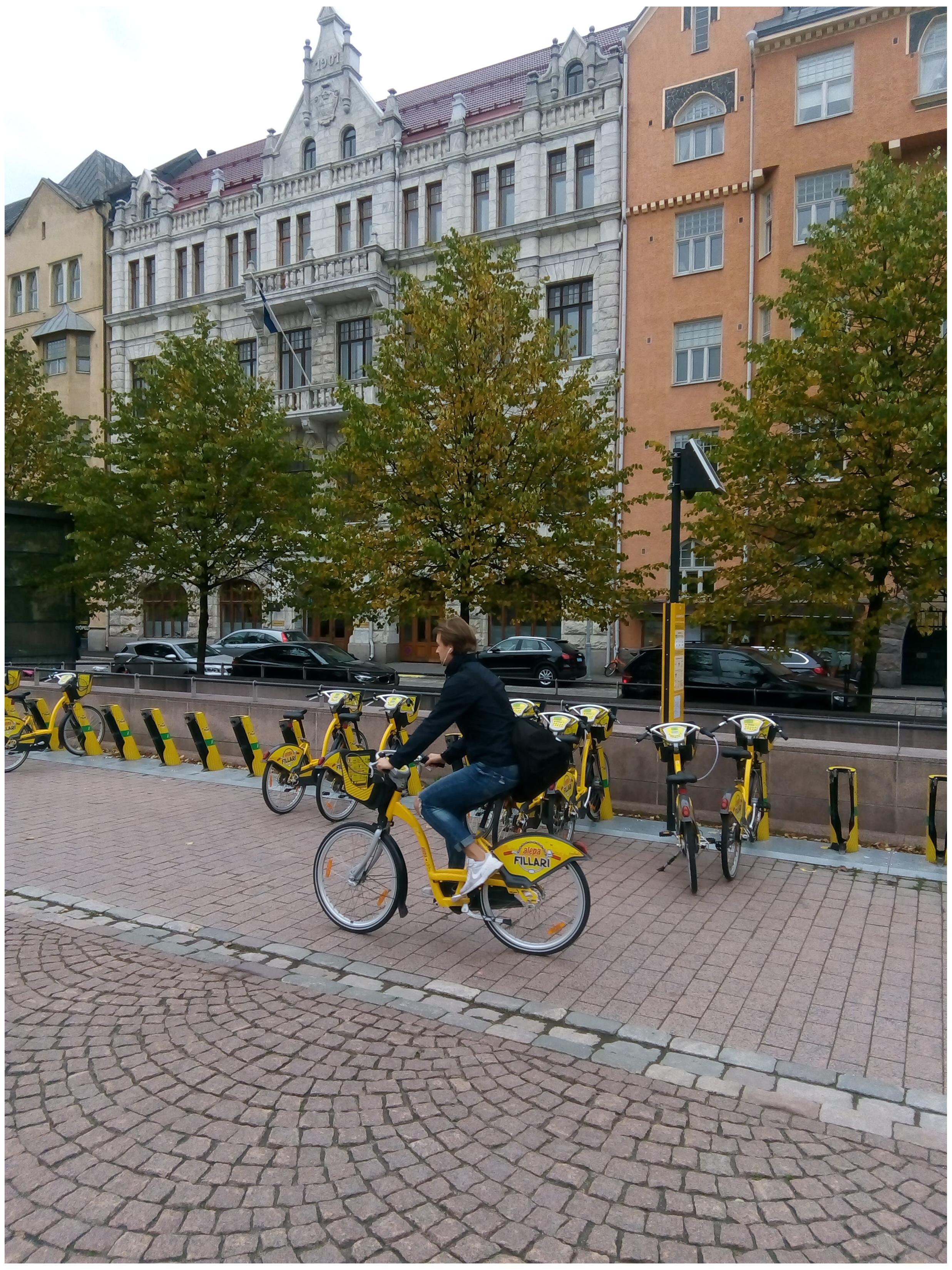 jälleenvalokuva ajapaikista